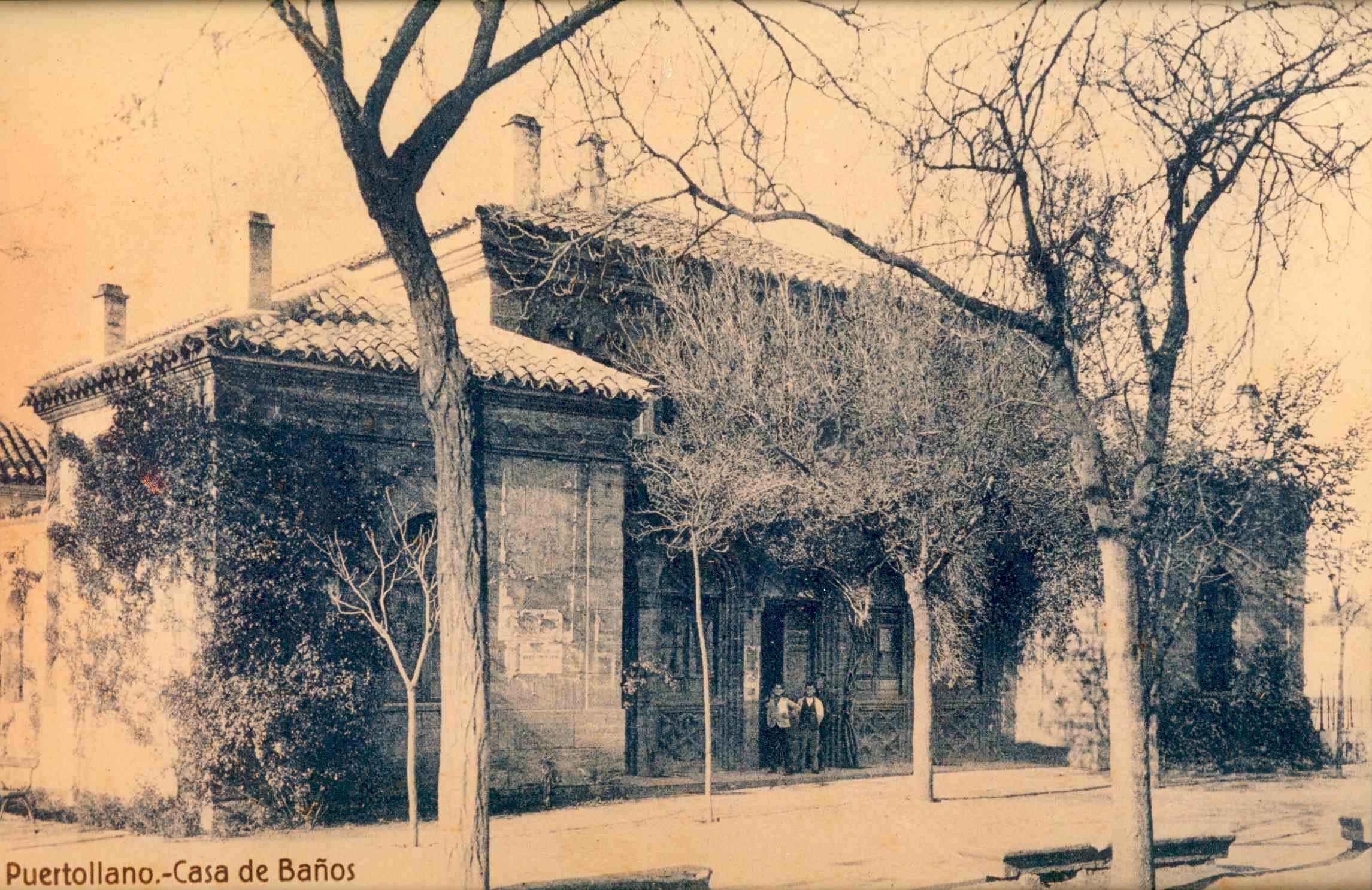 Actual oficina de Atención al Ciudadano y Oficina de Turismo